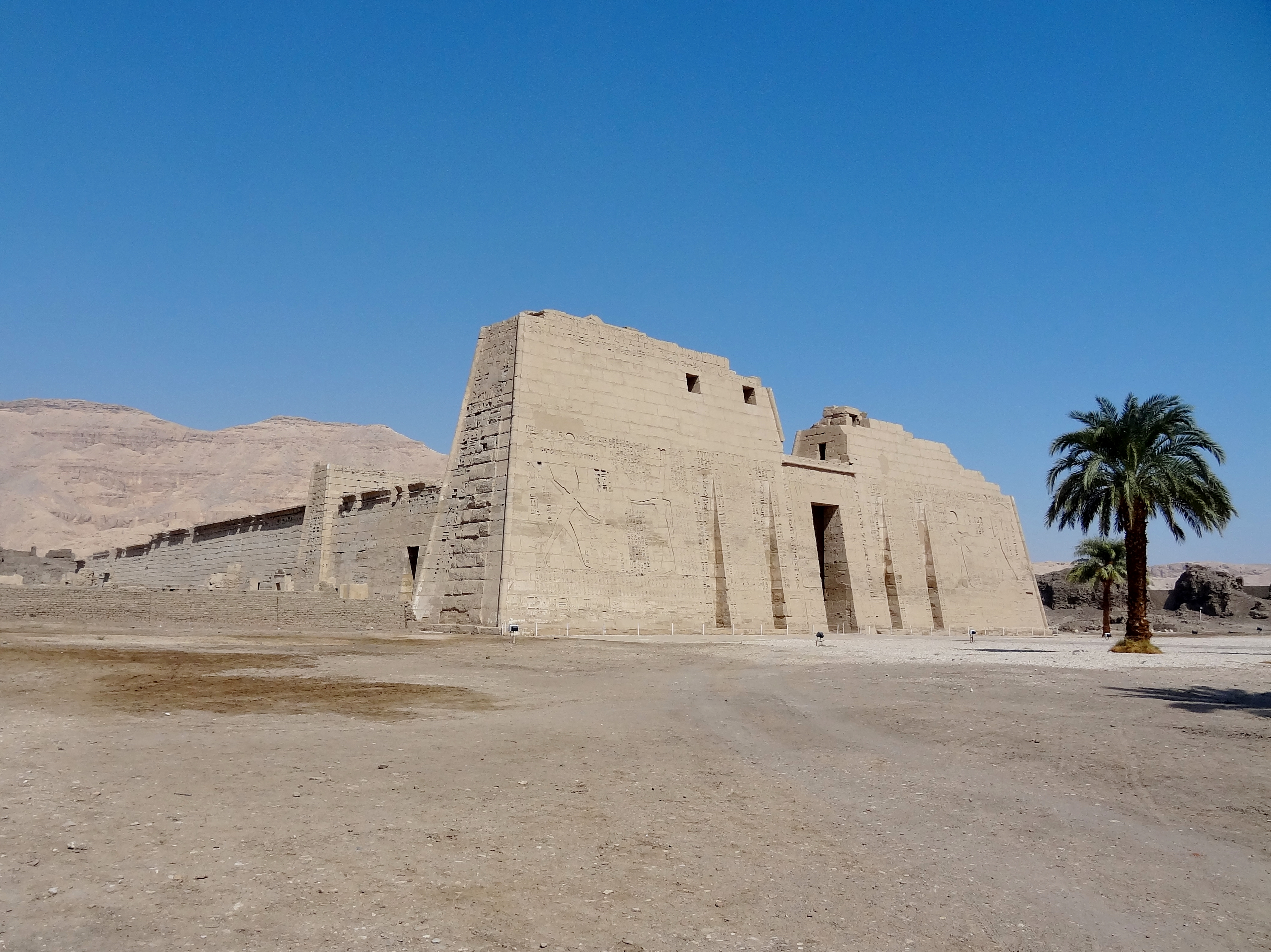 Totentempel Ramses’ III. in Medinet Habu, Ägypten